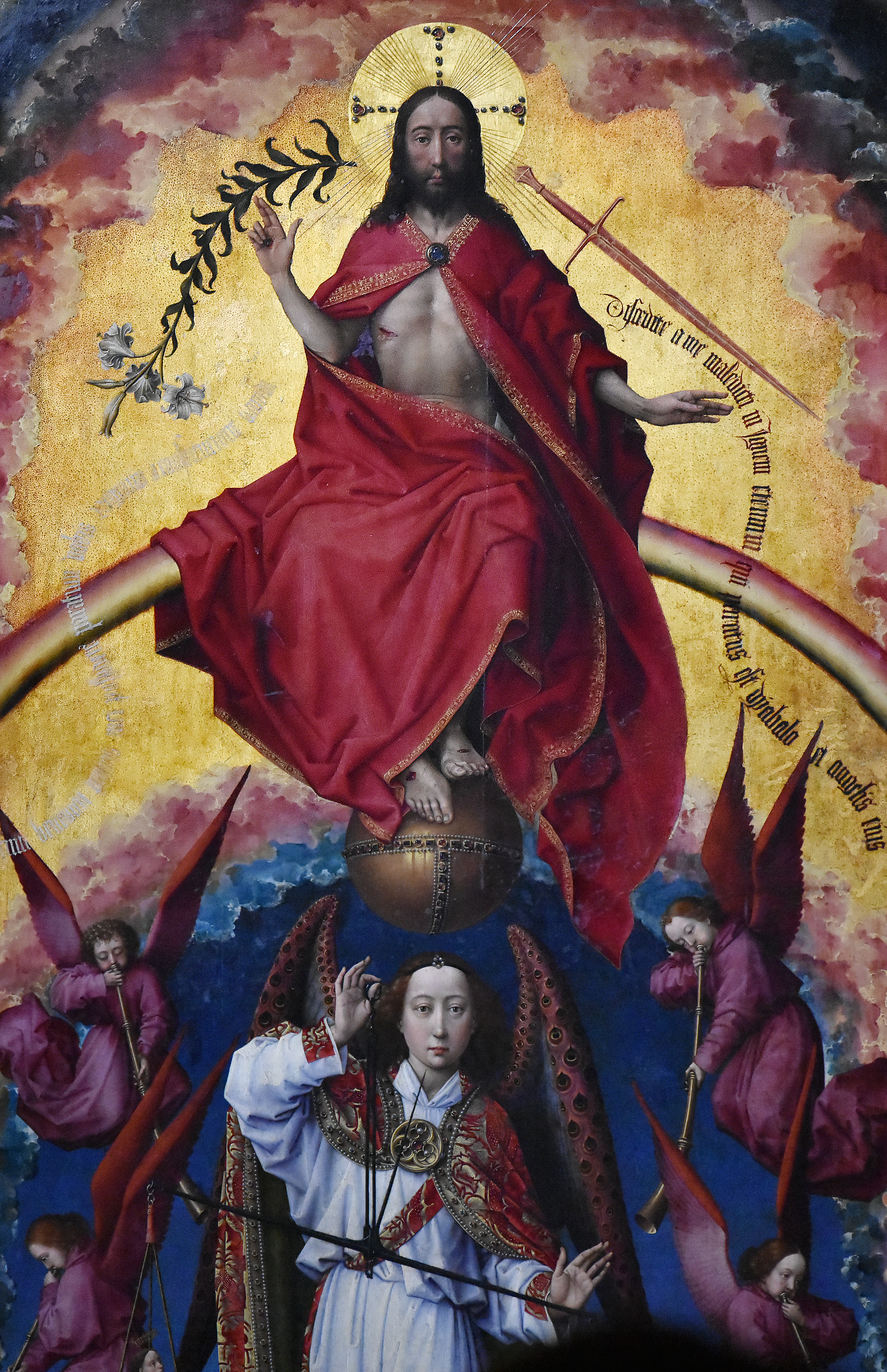 Rogier van der Weyden (1399of1400-1464) Het Laatste Oordeel - Hôtel-Dieu Beaune - detail van het centrale paneel